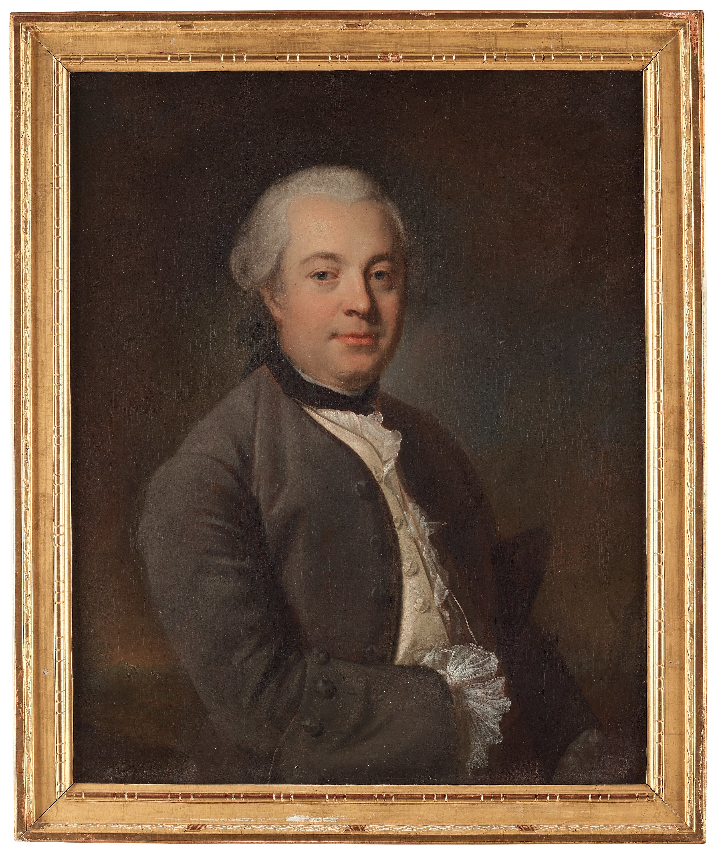 Kammarherren Carl Erik Waldenstierna (1723-1787). Avporträtterad ca 1770 av Lorens Pasch d.y.